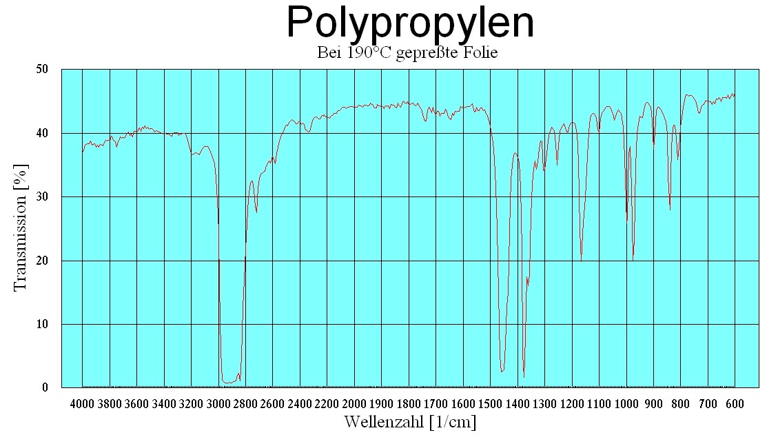 Polypropylen-Folie, ca. 38 µm dick